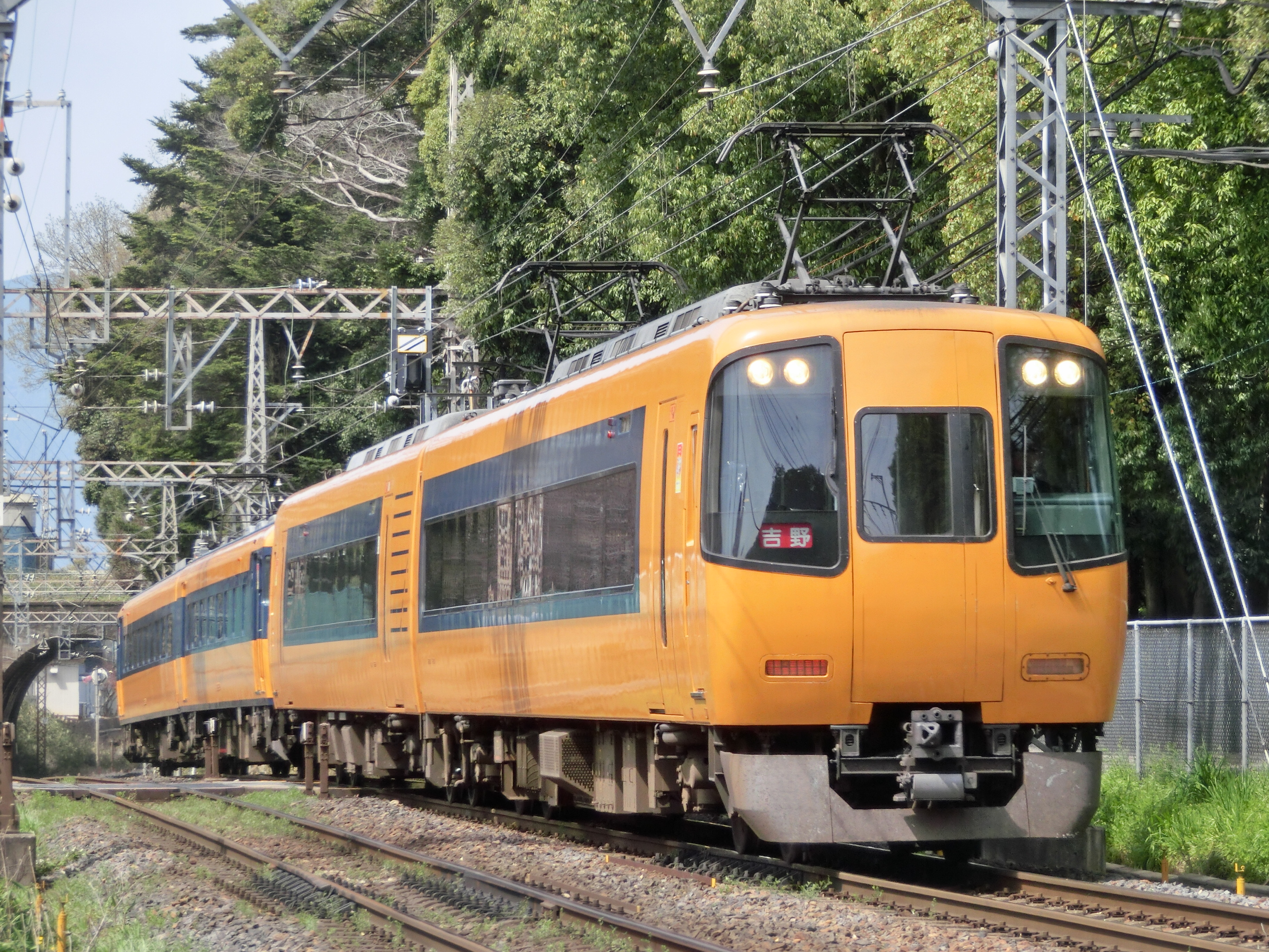 近畿日本鉄道16400系特急型電車